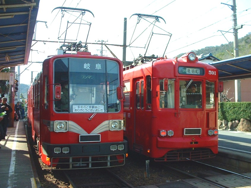 名鉄美濃町線野一色駅（現在廃線廃駅）